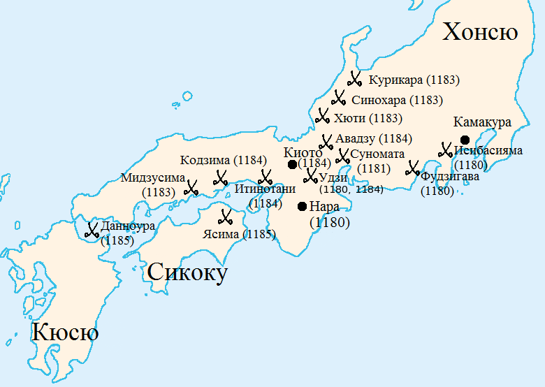 Война Тайра и Минамото